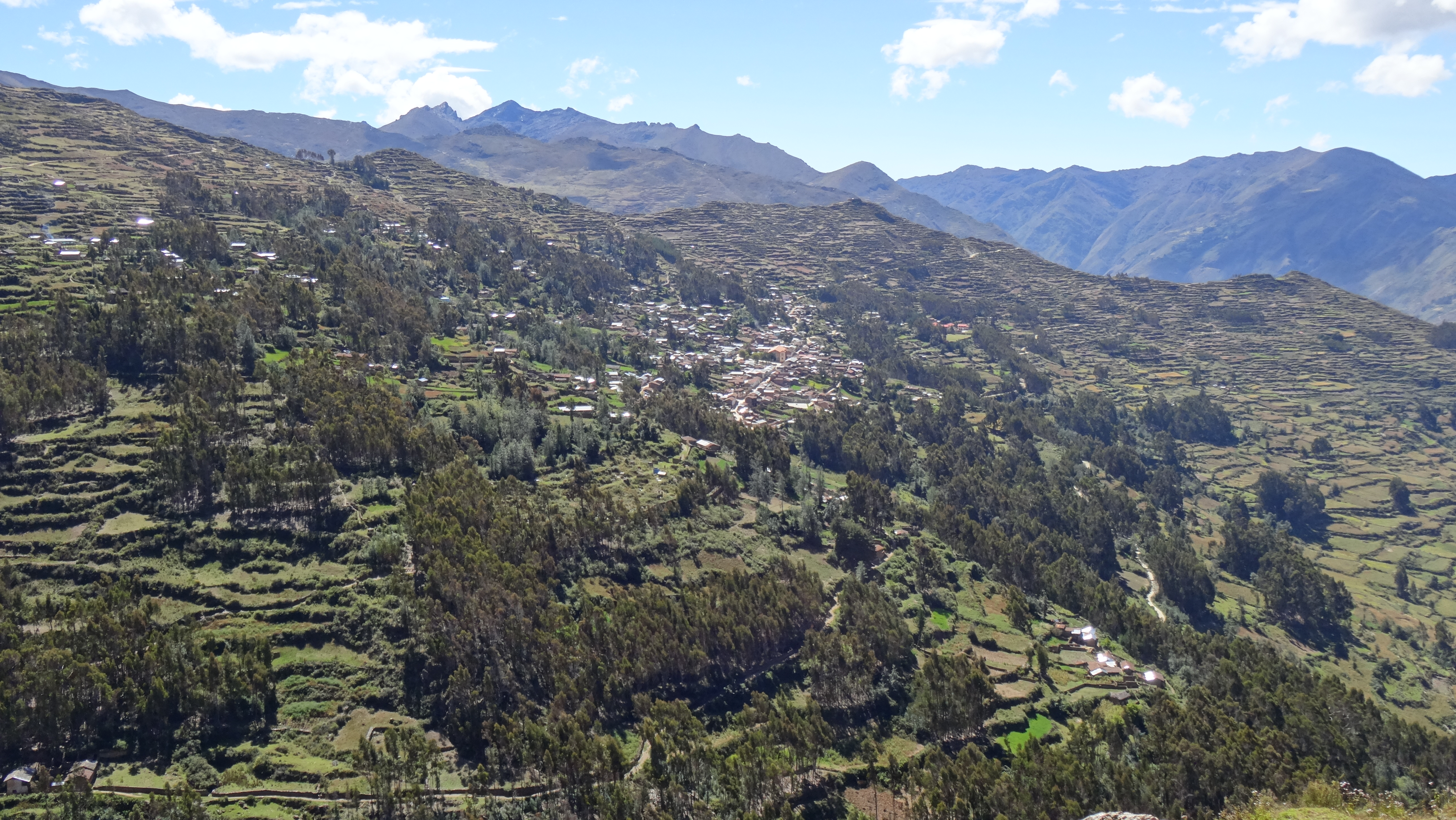 Vista del parte sureste del distrito de Singa desde Shinca.